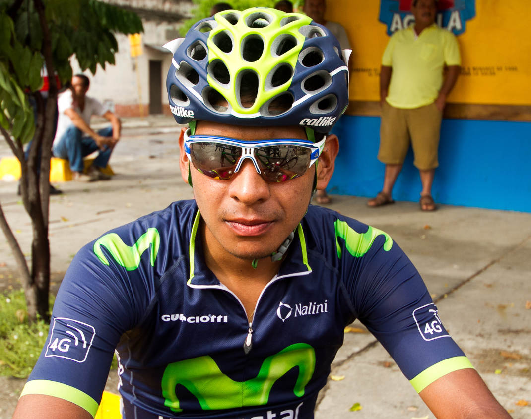 Etapa 6 Clásico RCN 2015 La Dorada - Santuario (185Kms).